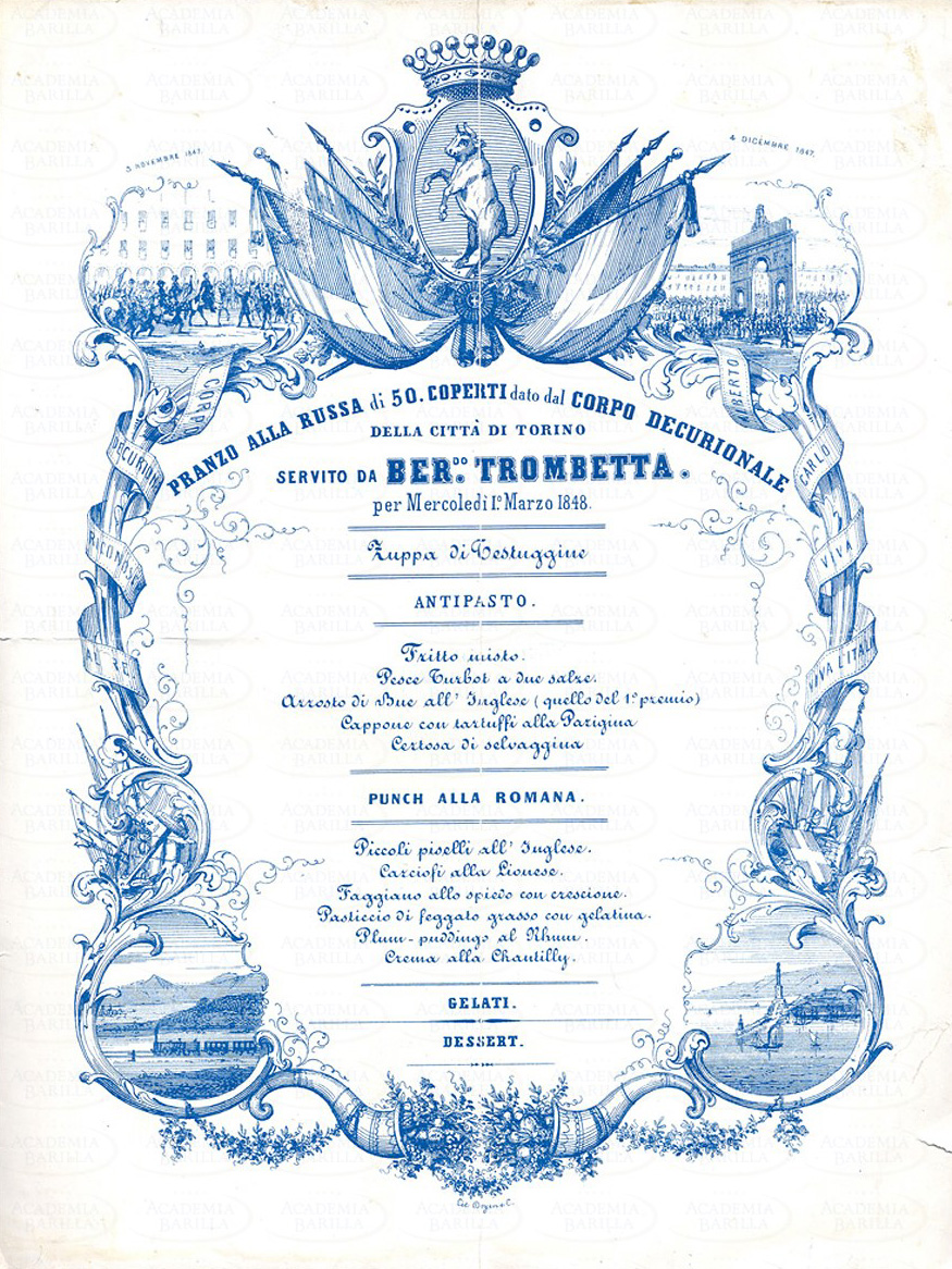 Menu del 1 marzo 1848 per le celebrazioni dello Statuto Albertino, Corpo Decurionale Città di Torino – Italia.